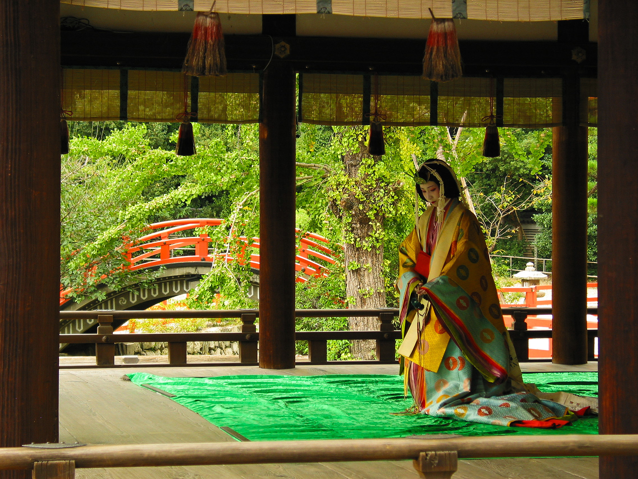 500px provided description: Kimono [#temple ,#japan ,#kimono]